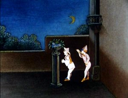 Pauvre Pierrot, bande désinée d' Émile Reynaud